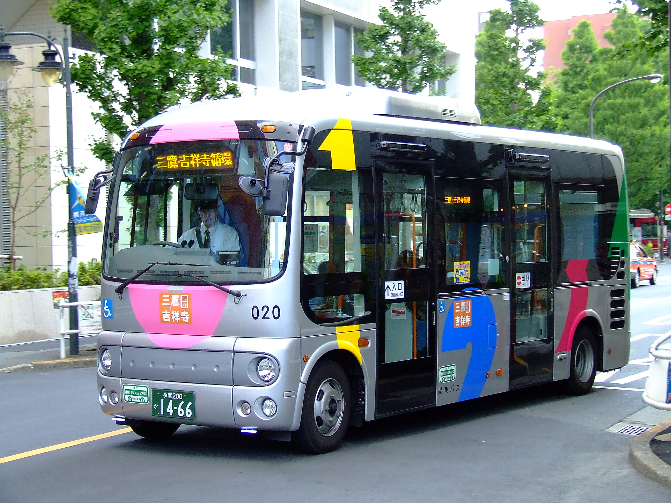 関東バス・武蔵野市のコミュニティバス「ムーバス」三鷹・吉祥寺循環 三鷹駅付近にて